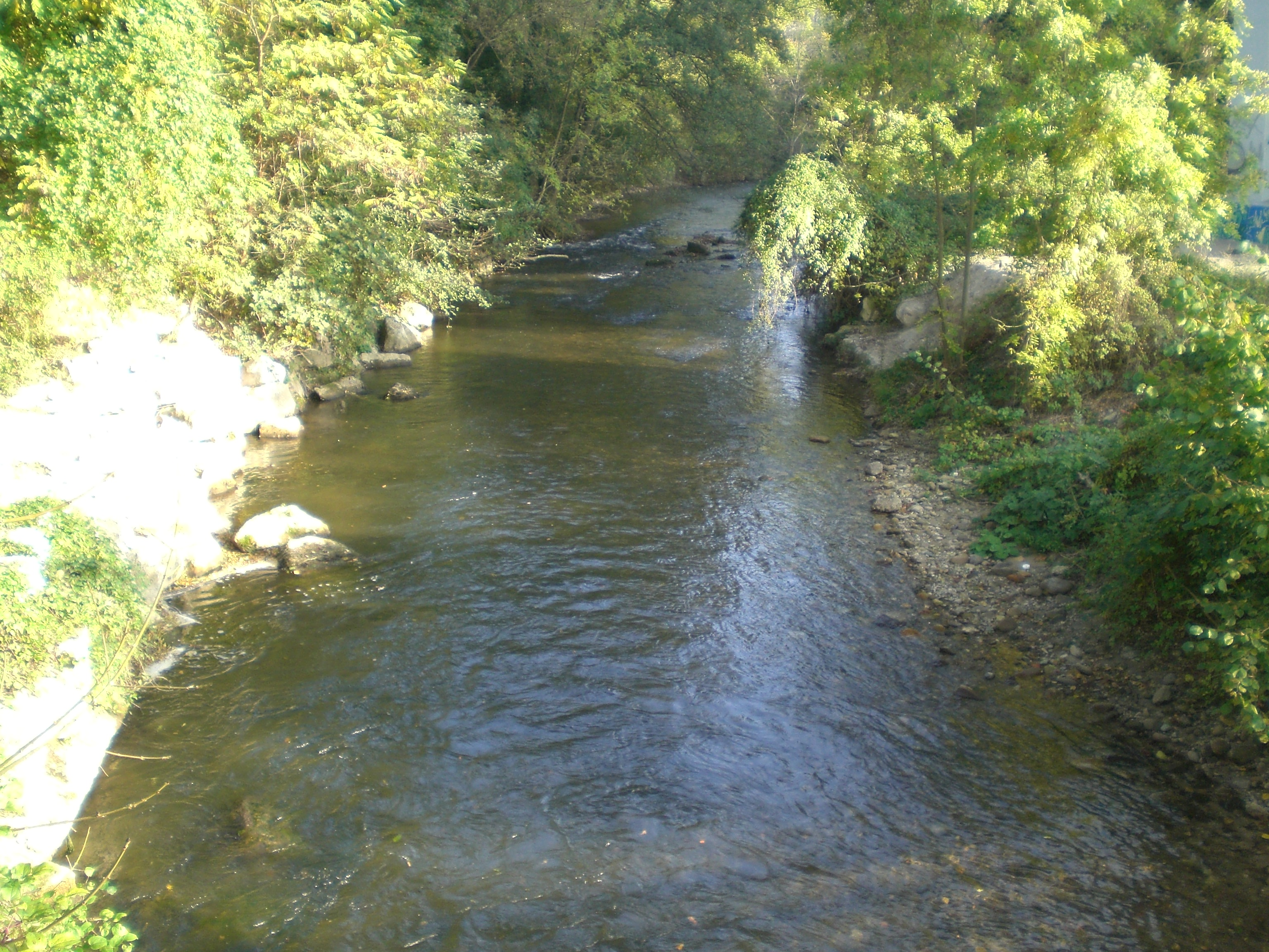 La Versoix lors de son passage sous l'autoroute A1